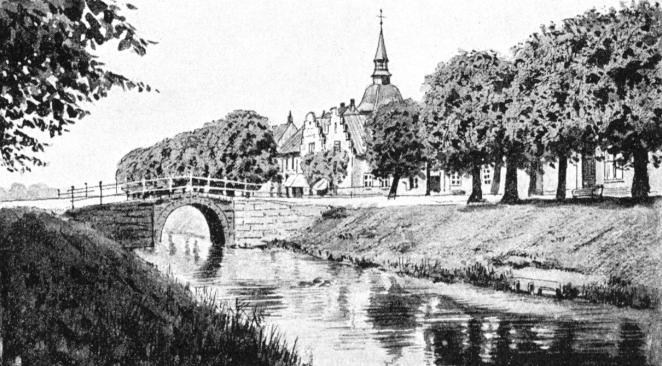 Kanal (Gracht) in Friedrichstadt um 1895